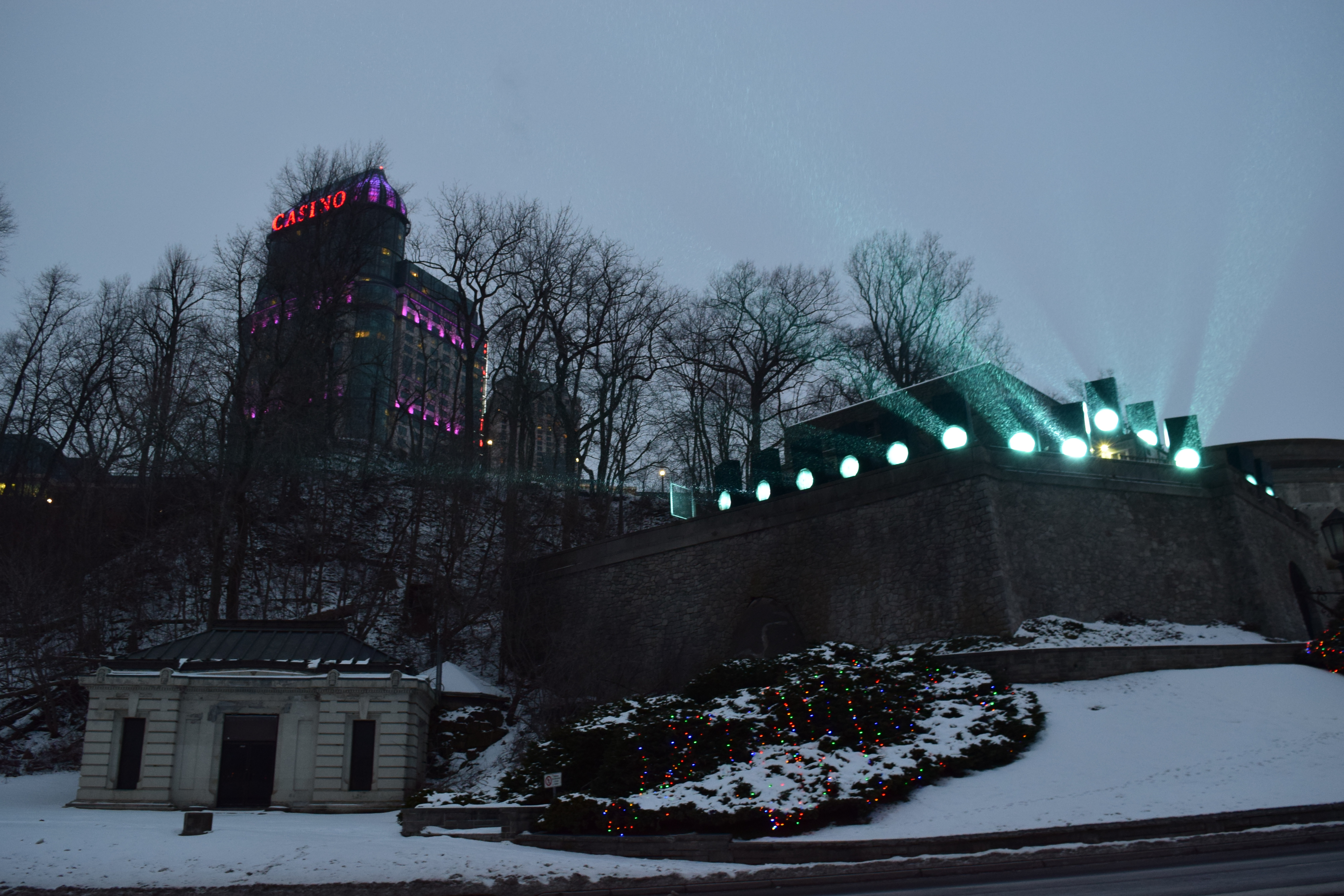 Fotografía tomada en Ontario Canadá